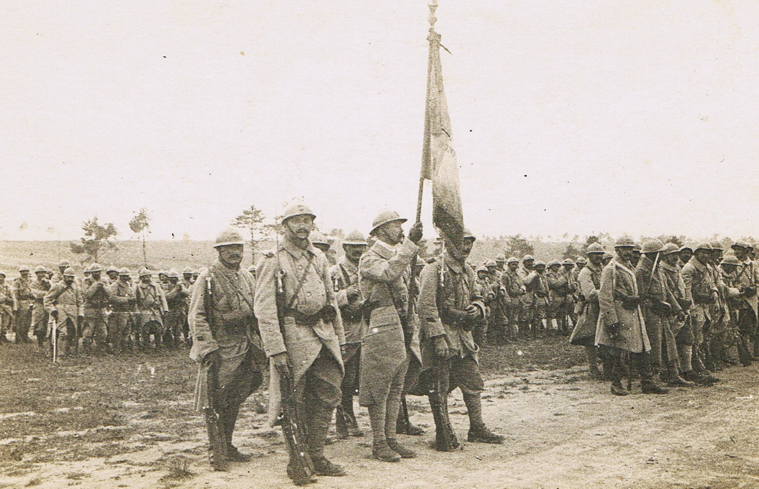 Le 247ème régiment d'infanterie et son porte-drapeau, le servannais Alexandre Miniac (1885-1963), durant la guerre de 1914-1918.